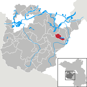 Seddiner See in Brandenburg (Country) - District Potsdam-Mittelmark